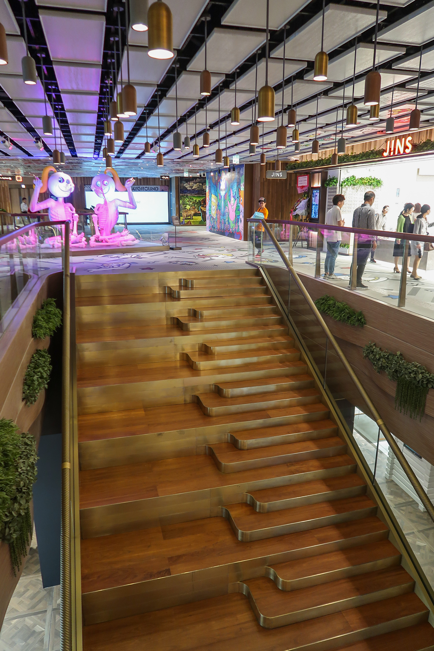 K11 MUSEA Level 3 Big Steps